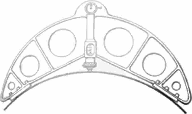 Disegno di calibro a cavaliere, realizzato da me medesimo utilizzando come esempio il libro Disegno meccanico per operai disegnatori e tracciatori; poi scandito, vettorializzato, pulito e riconvertito in bitmap.